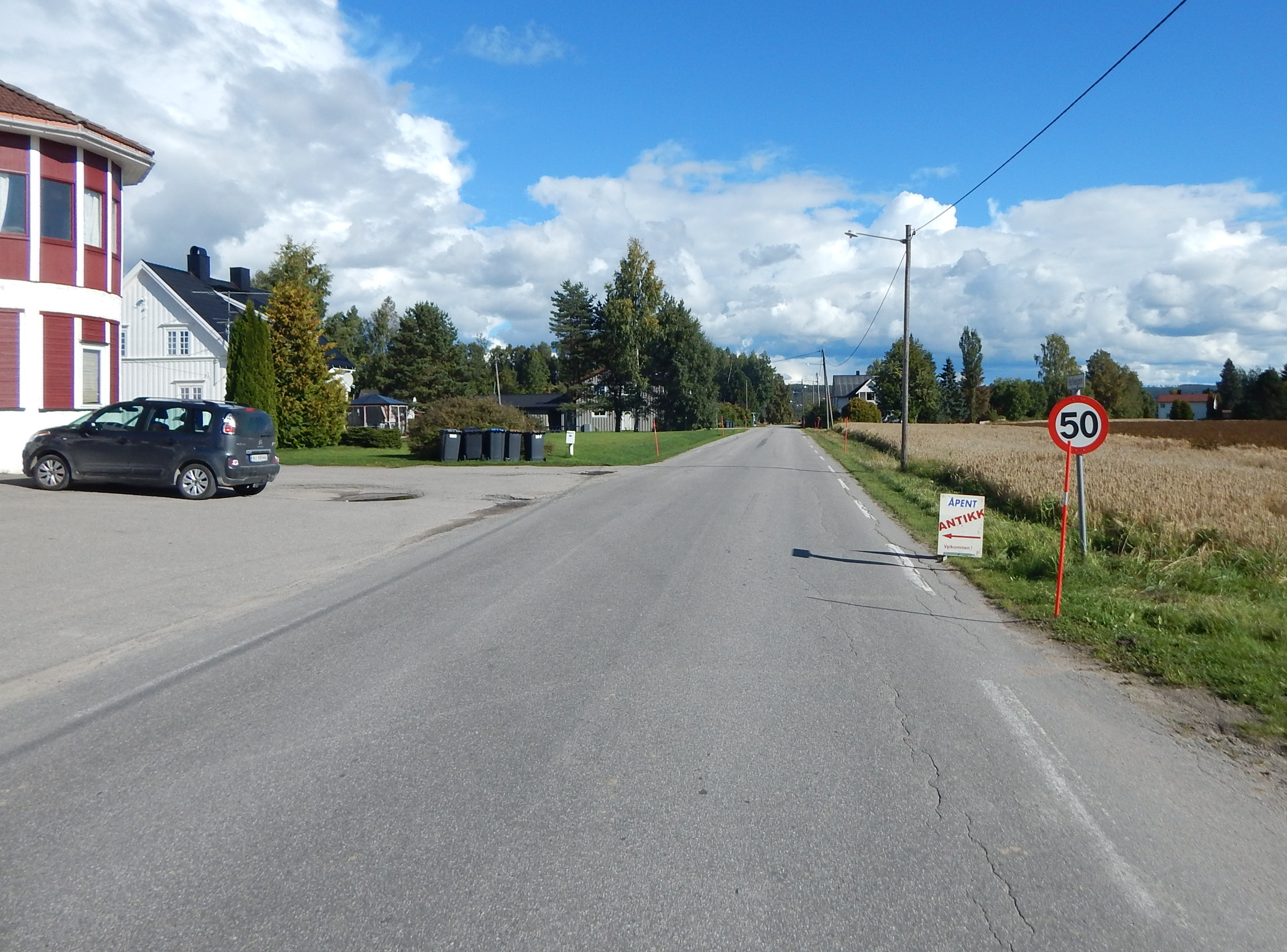 Hofvegen (fylkesvei 434) østover fra bygdesenteret i Hof